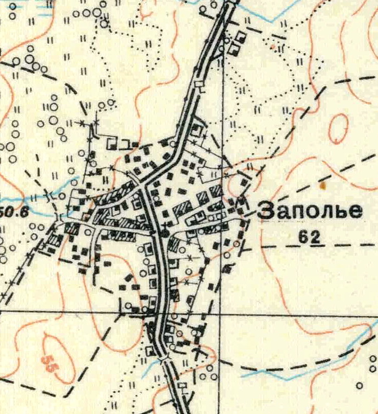 Топографическая карта Ленинградской области, квадрат О-35-22-Г-а (Керстово), деревня Заполье.